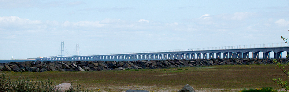 Storbæltsbroen set fra Nyborg. en: The "Great Belt Bridge" seen from Nyborg